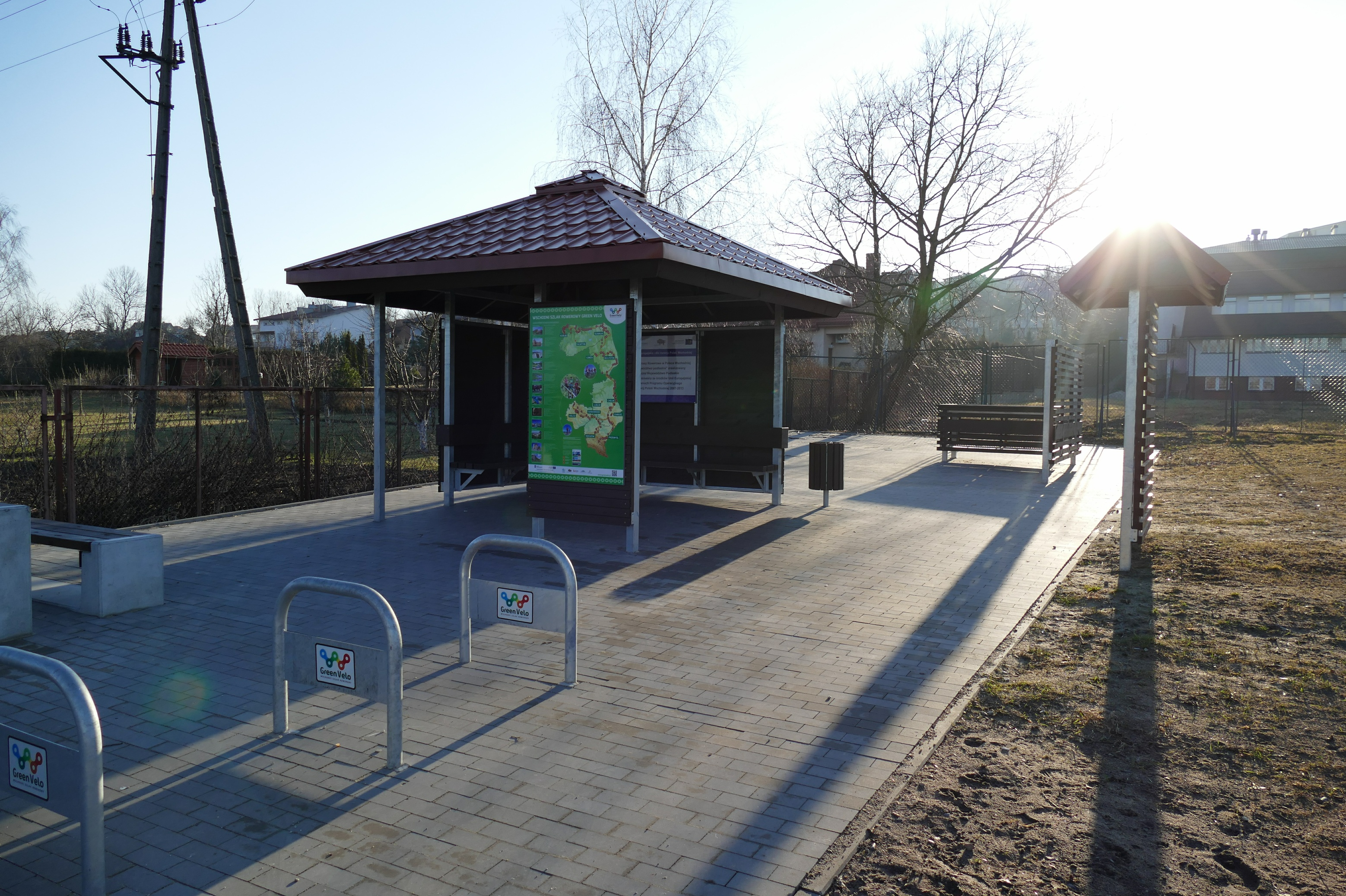 Miejsce obsługi rowerzystów (MOR) na trasie Wschodniego Szlaku Rowerowego Green Velo w Łomży